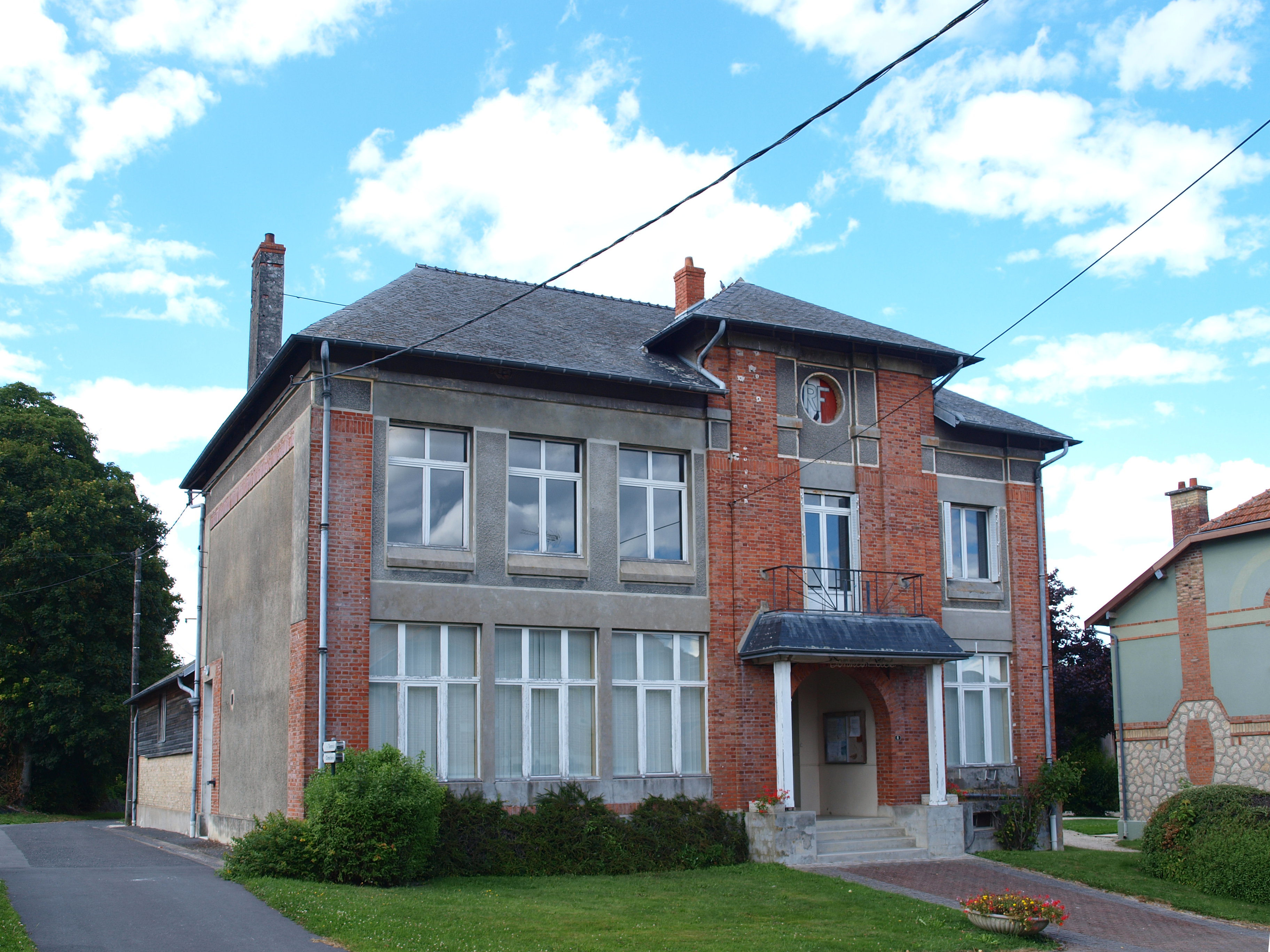 Manre (Ardennes, France) ; mairie